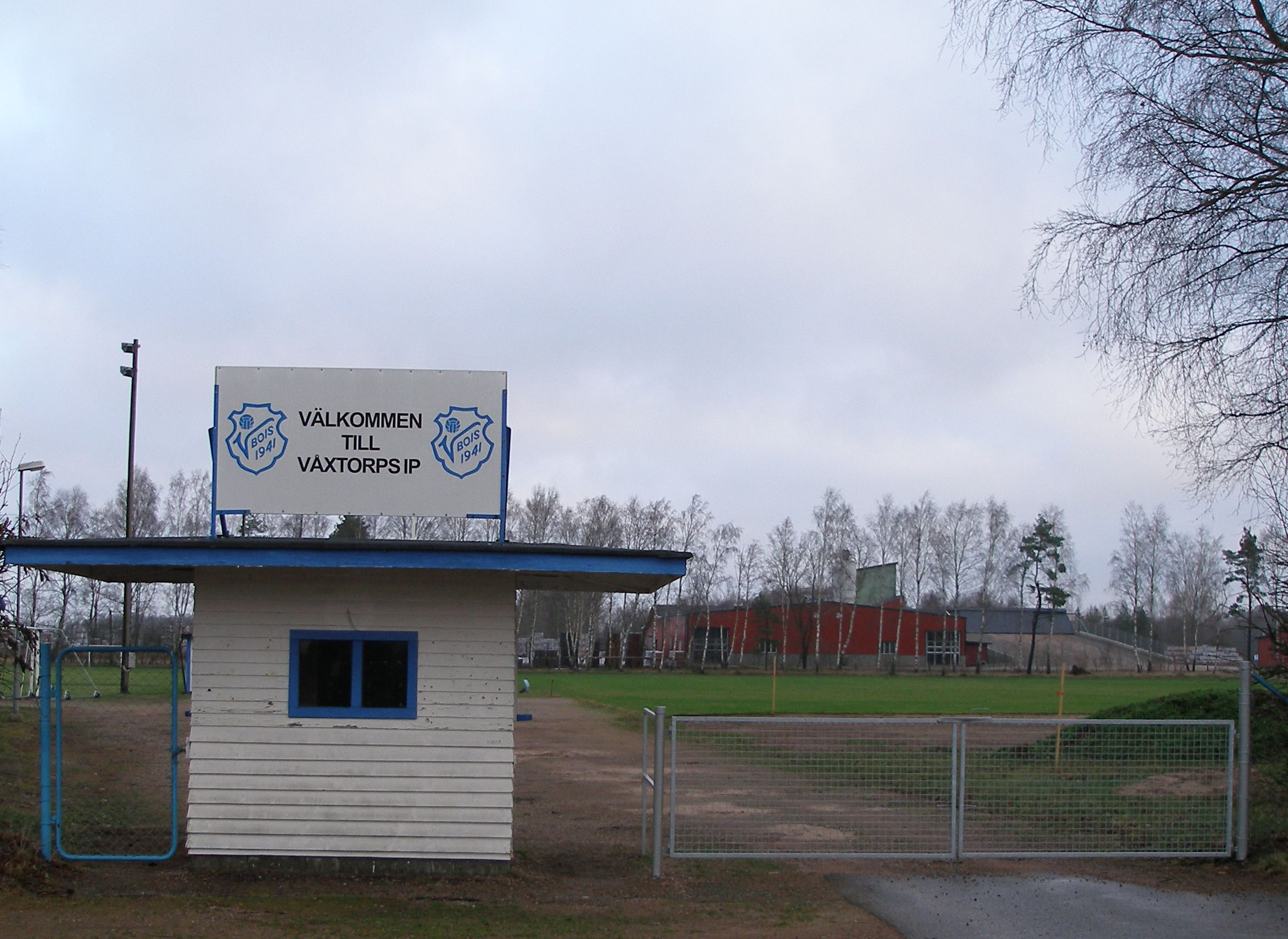 Bild på entrén till Våxtorps idrottsplats.